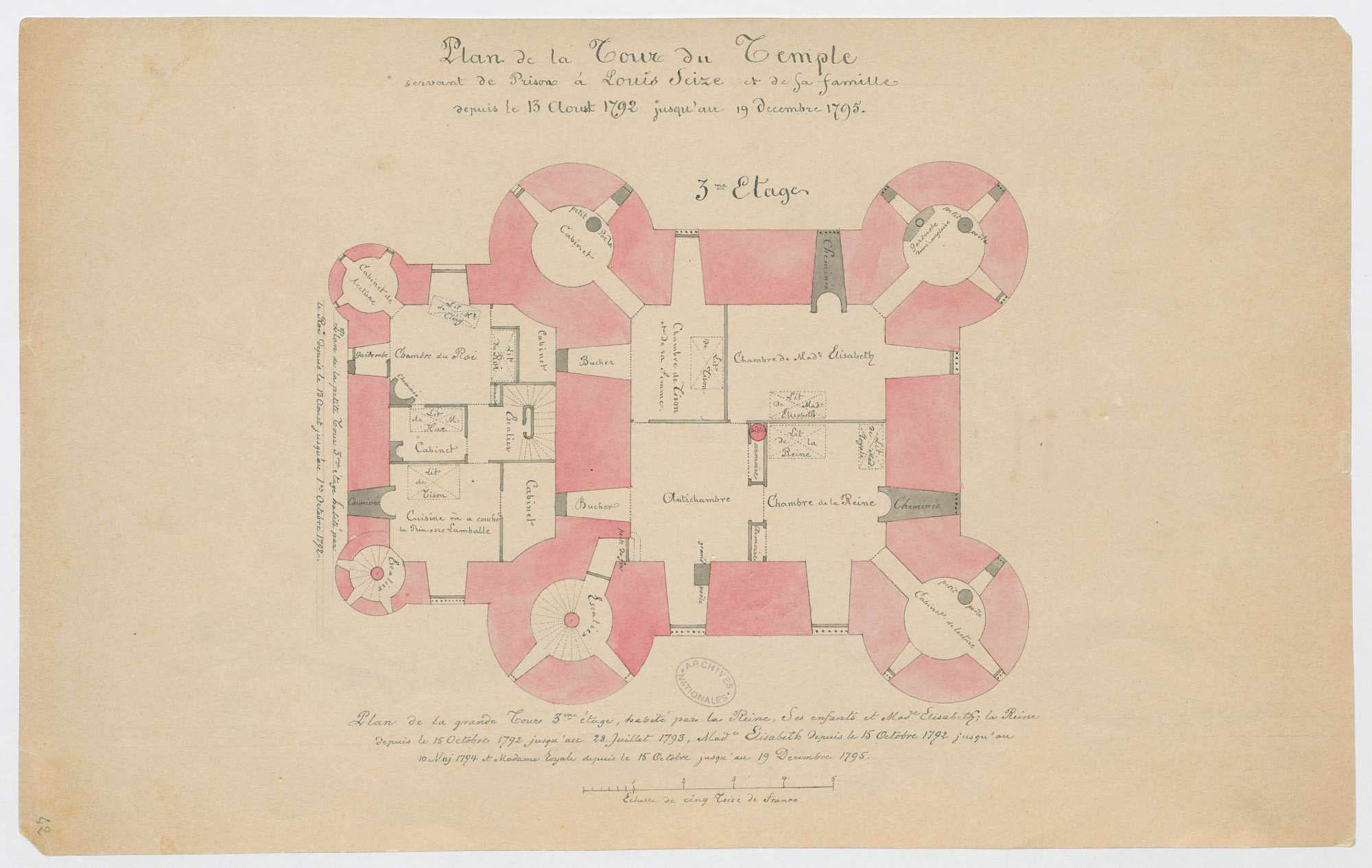 Plan du troisième étage du Temple, avec indication des pièces où étaient emprisonnés Louis XVI et sa famille à partir du 13 août 1792. La petite tour, à droite, était affectée au roi, tandis que la reine et ses enfants étaient logés dans la grande tour, à gauche